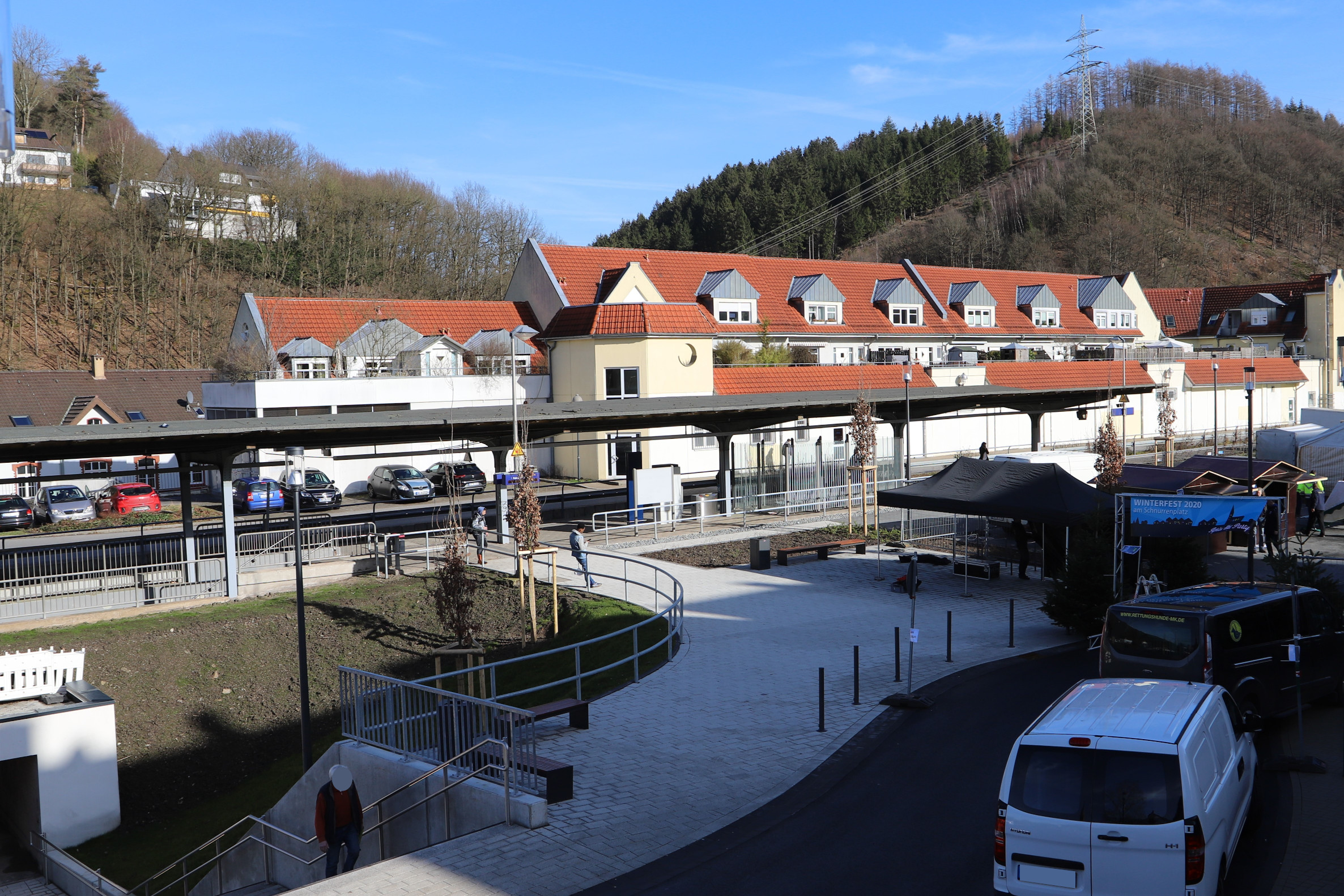 Der Bahnhof in Schalksmühle